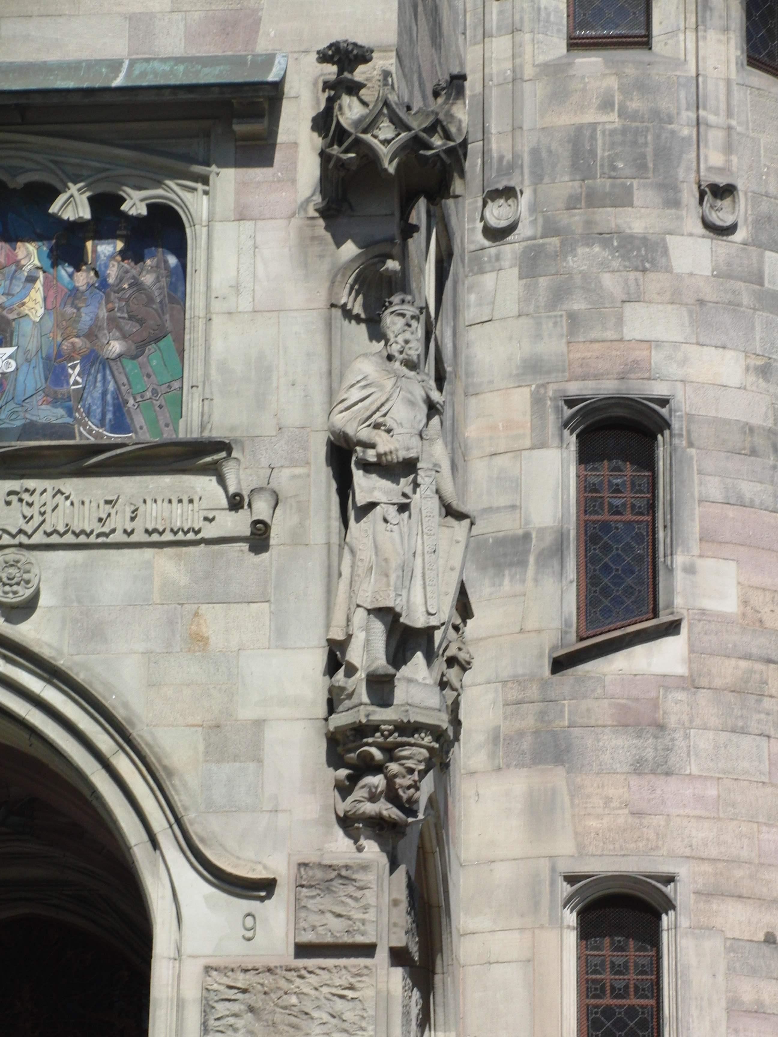 CIMG8187